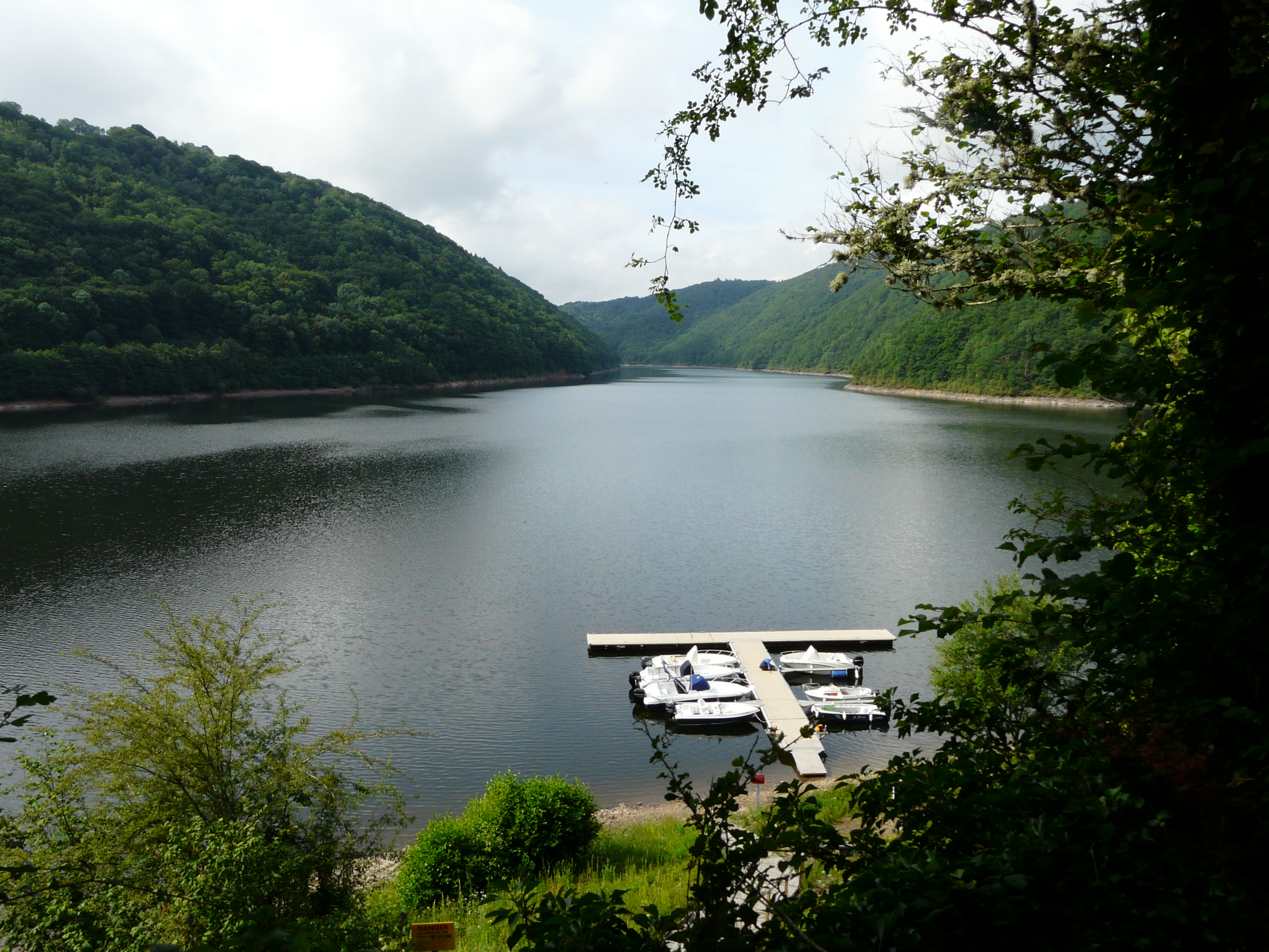 Le lac de Bort-les-Orgues en contrebas de l'ancien prieuré de Port-Dieu ; au premier plan, commune de Confolent-Port-Dieu (Corrèze) ; au second plan sur la droite commune de Monestier-Port-Dieu, et sur la gauche, commune de Larodde (Puy-de-Dôme).